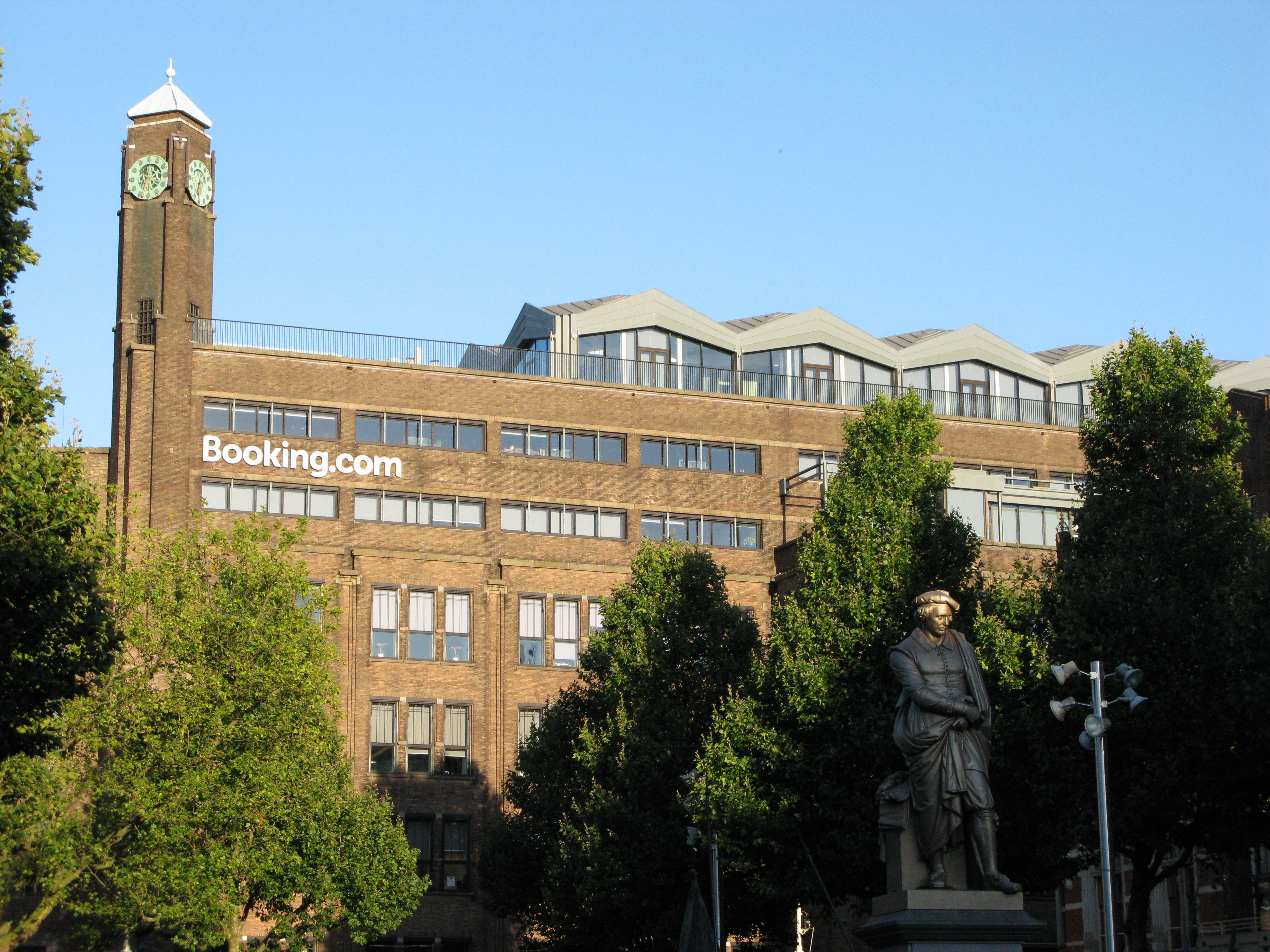 Headquarters Amsterdam（Rembrandt square side）